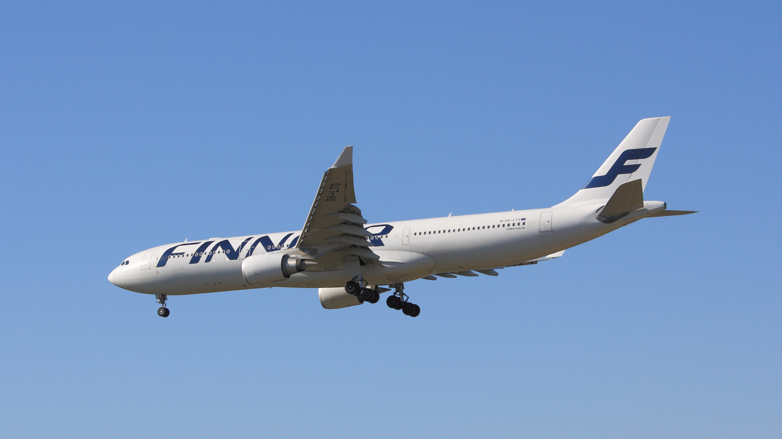 OH-LTO Finnair Airbus A330 landing Helsinki-Vantaa (HEL) rwy 22L